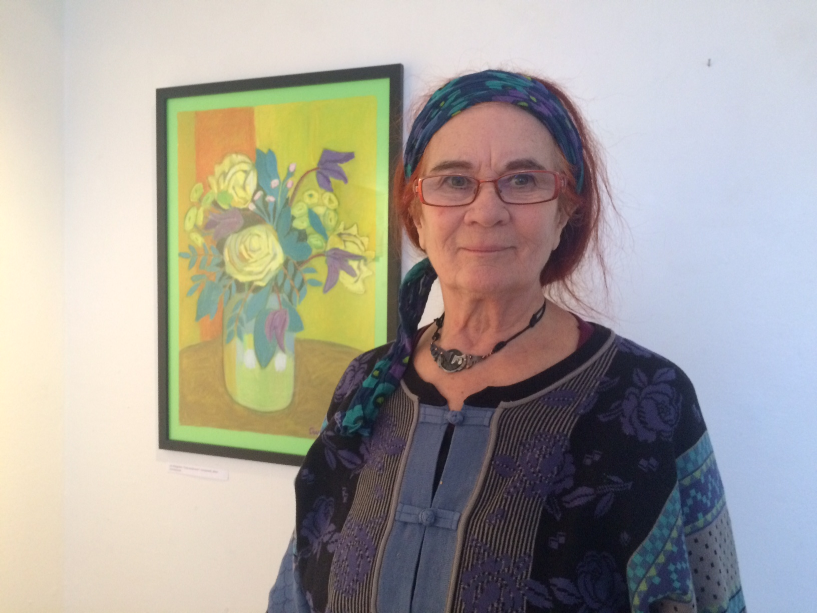 Liv Margolius står framför sin tavla mars 2018 i Gula Villan. Utställingen Gult arrangerad av Järna Konstnärsföreningen. Foto: Evelin Tamm